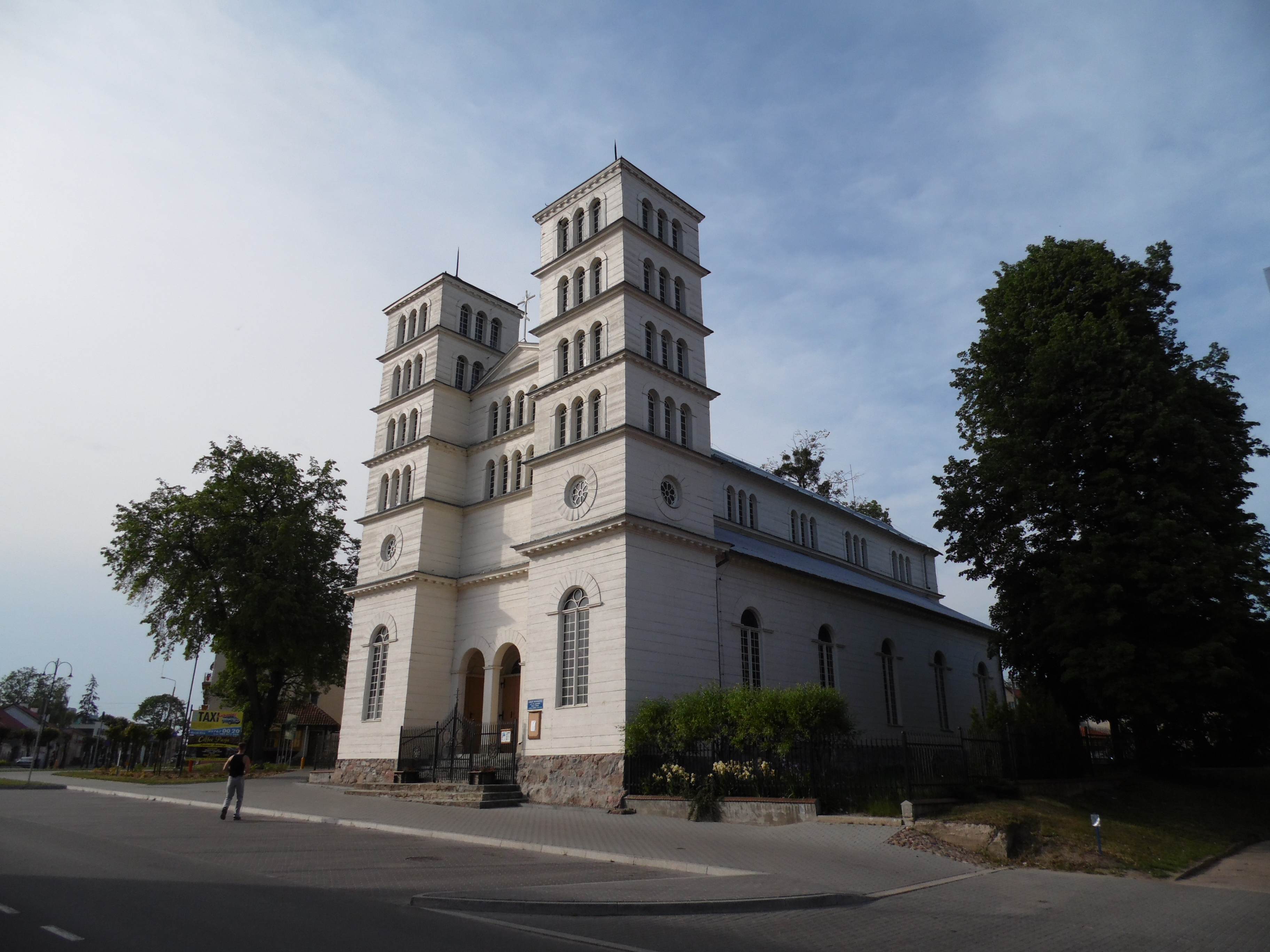 CERKIEW.